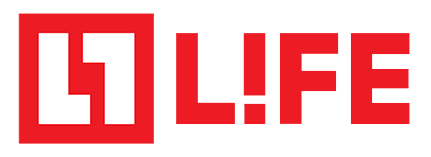 Логотип телеканала Life с 18 апреля 2016 года.